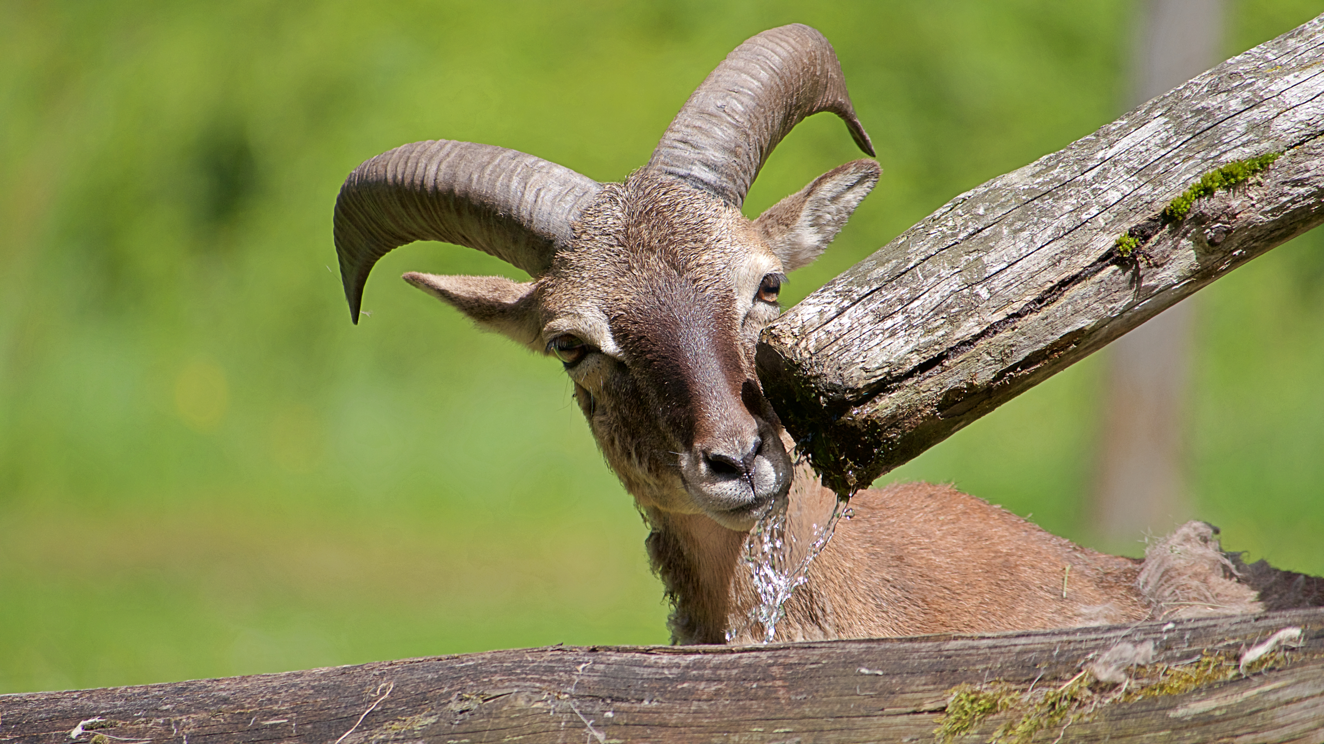 Mufflon selbst aufgenommen